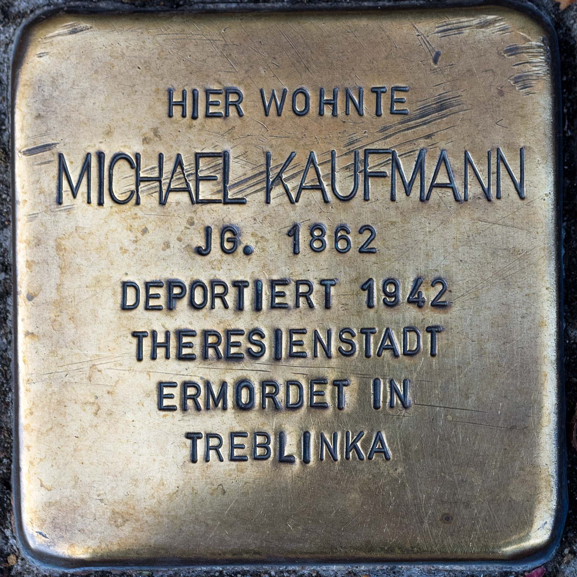 2016 Stolpersteine Toevo Michael Kaufmann